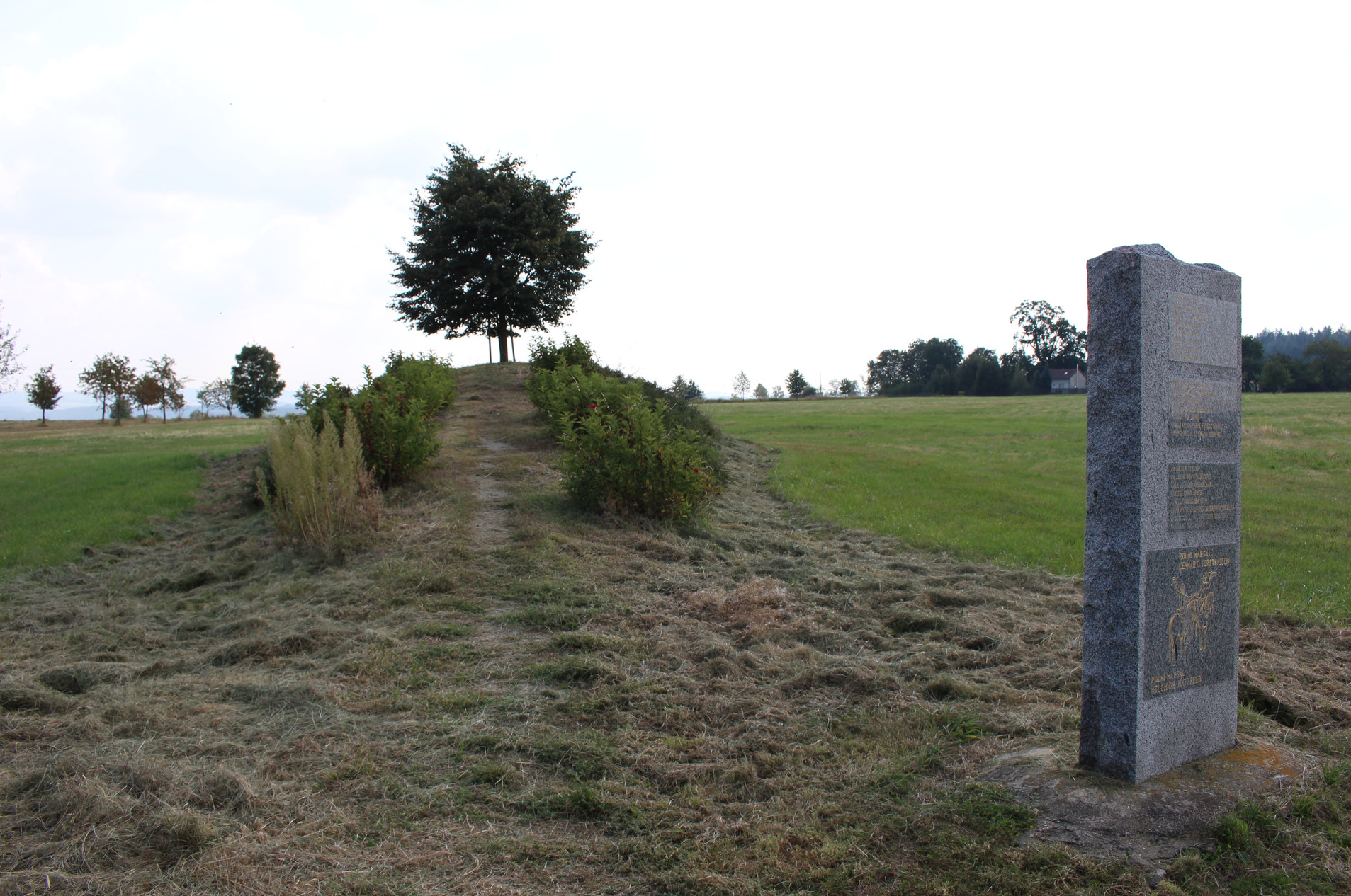 Památník bitvy u Jankova, okres Benešov, Středočeský kraj